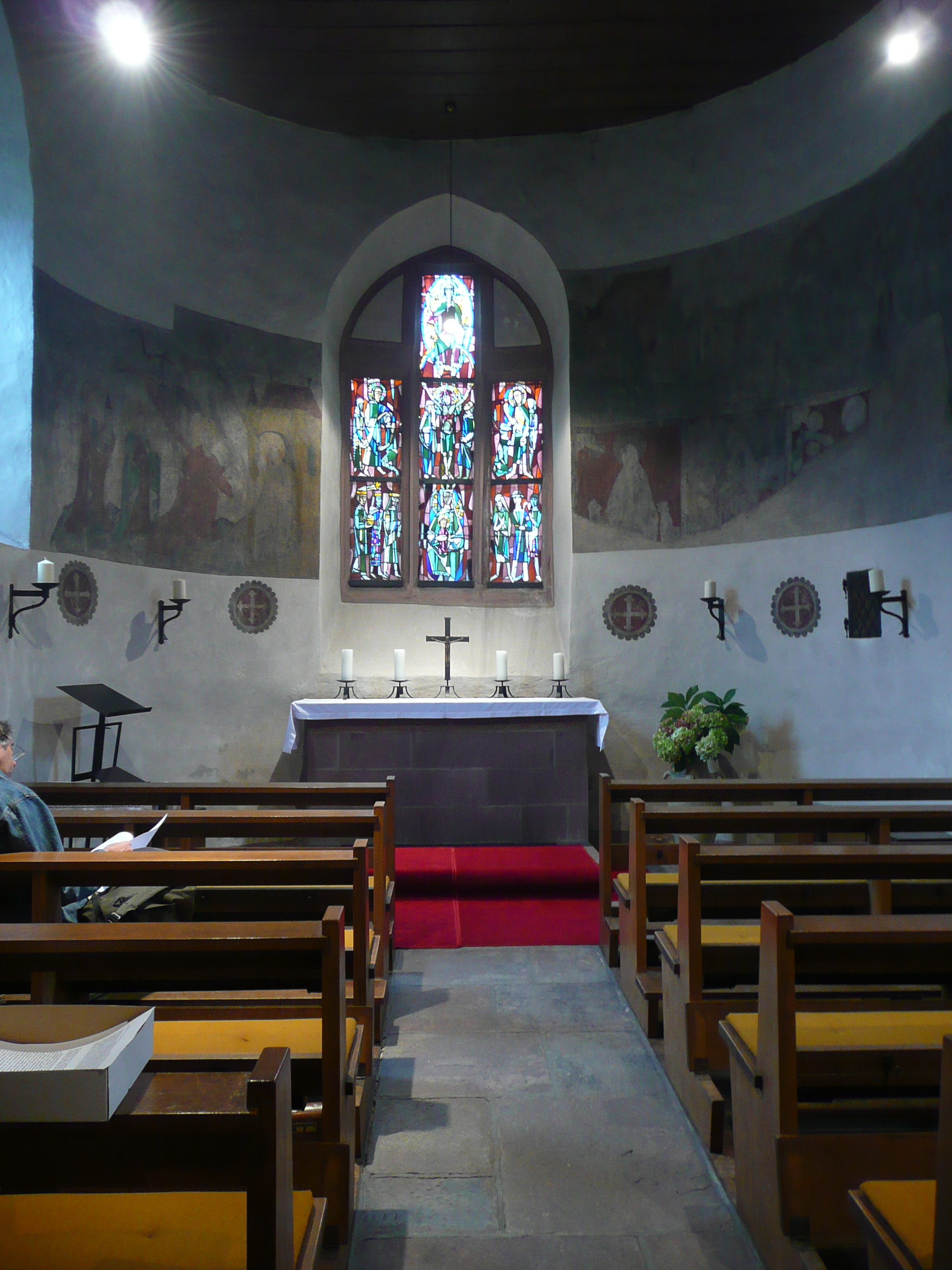 Apsis der Gutleuthofkapelle in Heidelberg-Schlierbach (Deutschland)